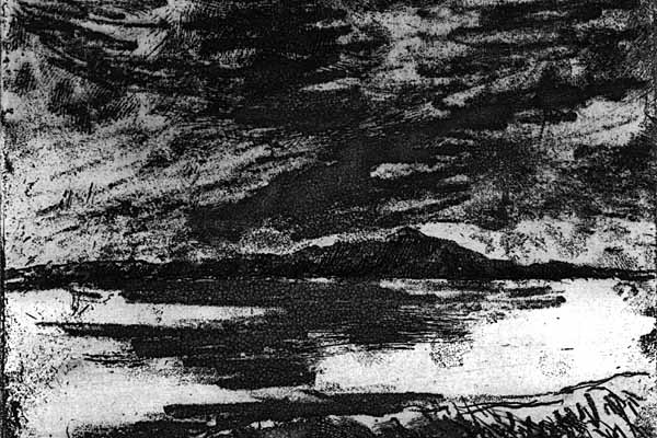 De: Beschreibung: Vernis Mou von Wolfram Gothe; 1990 Quelle: Urheber: Wolfram Gothe Est: Tegemist on pehmelakitehnikas teostatud teosega, mis on mõeldud illustreerima seda artiklit.